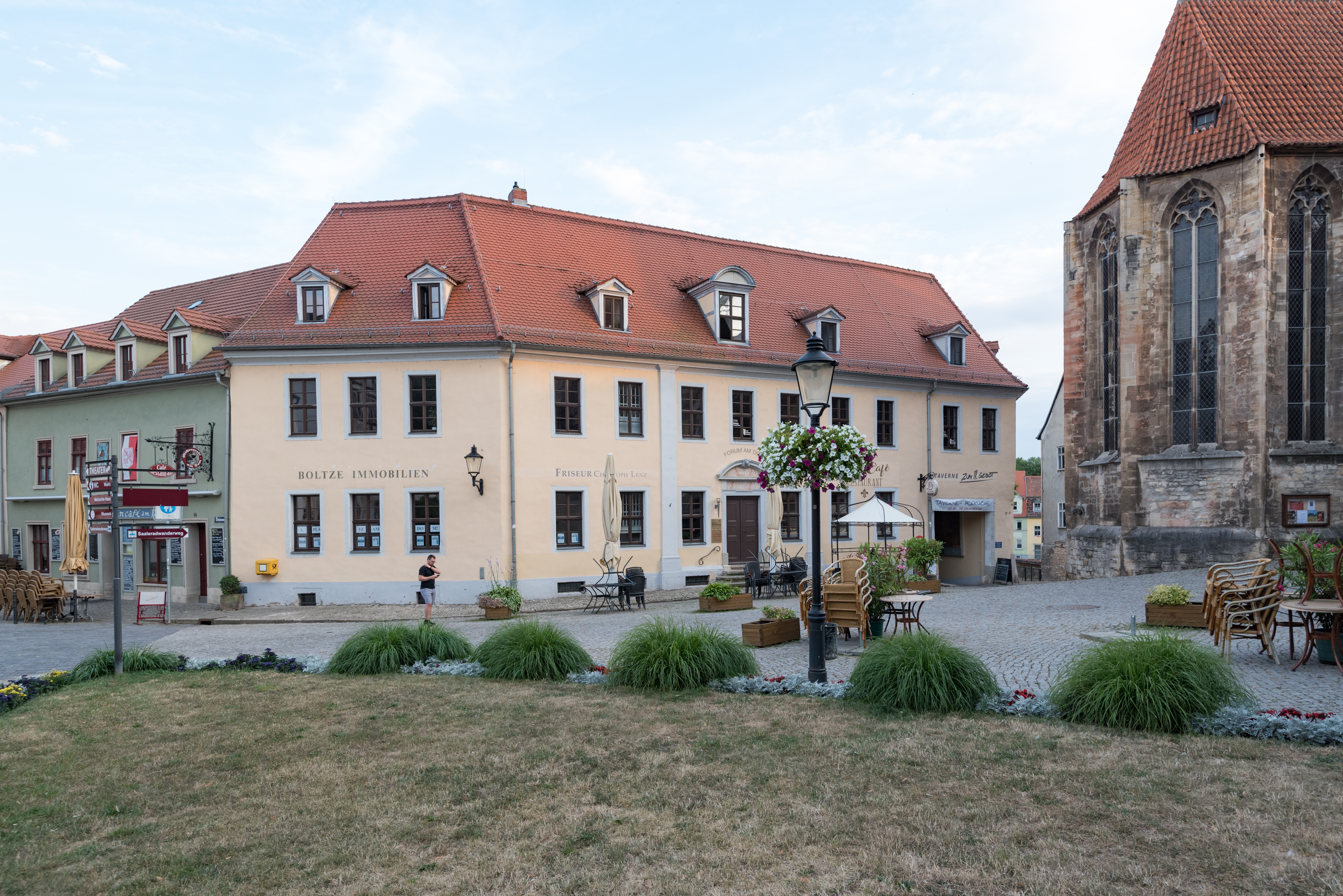 Naumburg (Saale), Domplatz 21